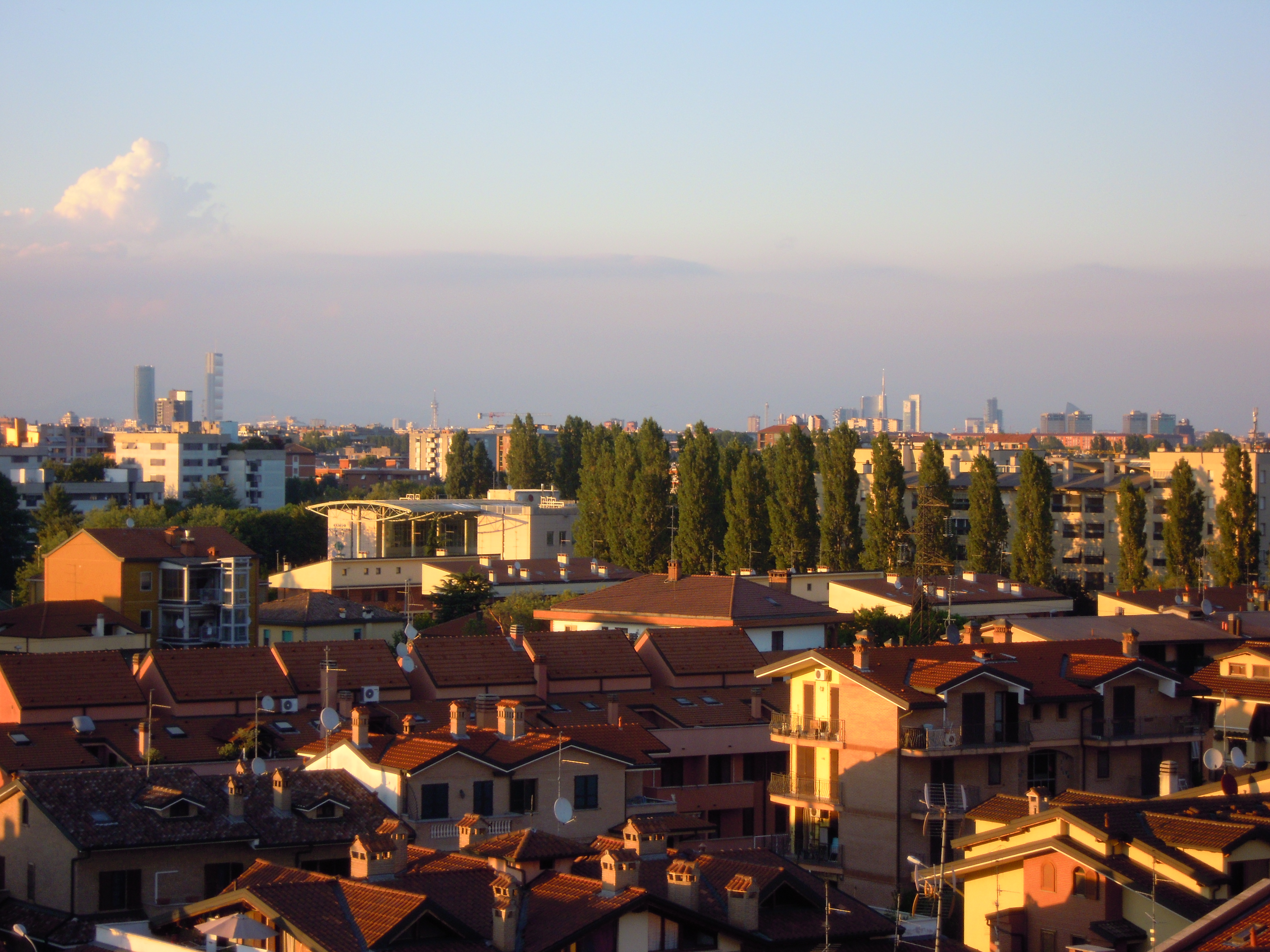 Uno scorcio di Buccinasco, con Milano sullo sfondo. (2017)